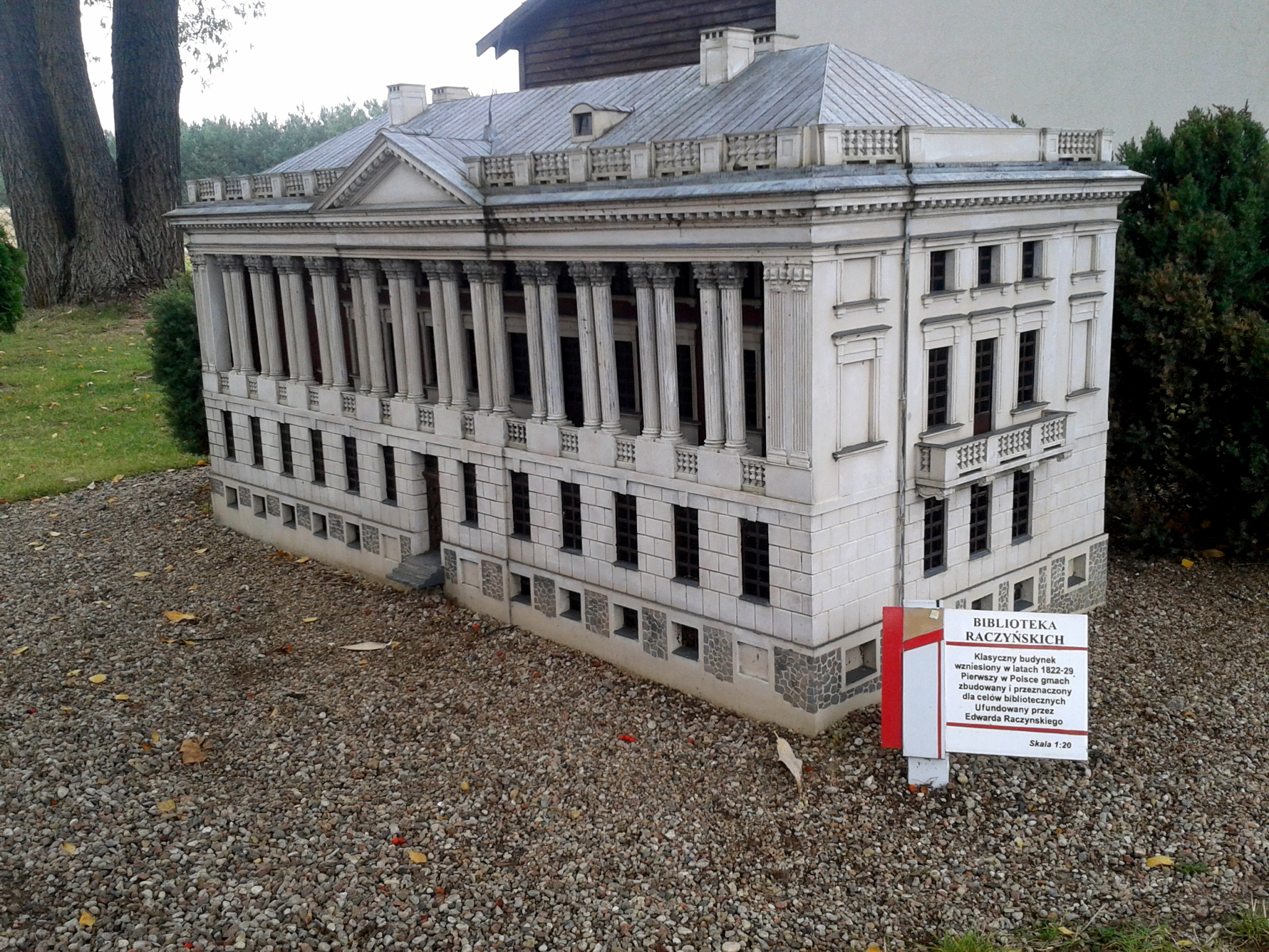 Biblioteka Raczyńskich - Pobiedziska